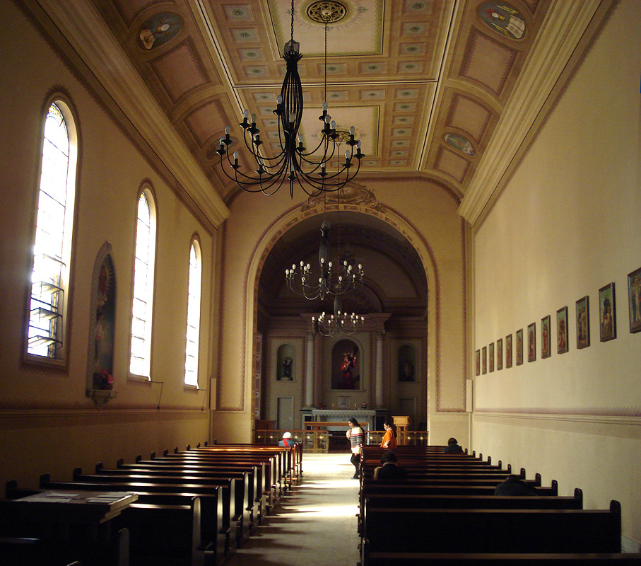 Interior da Capela Nosso Senhor dos Passos, na Santa Casa de Misericórdia de Porto Alegre, Brasil.